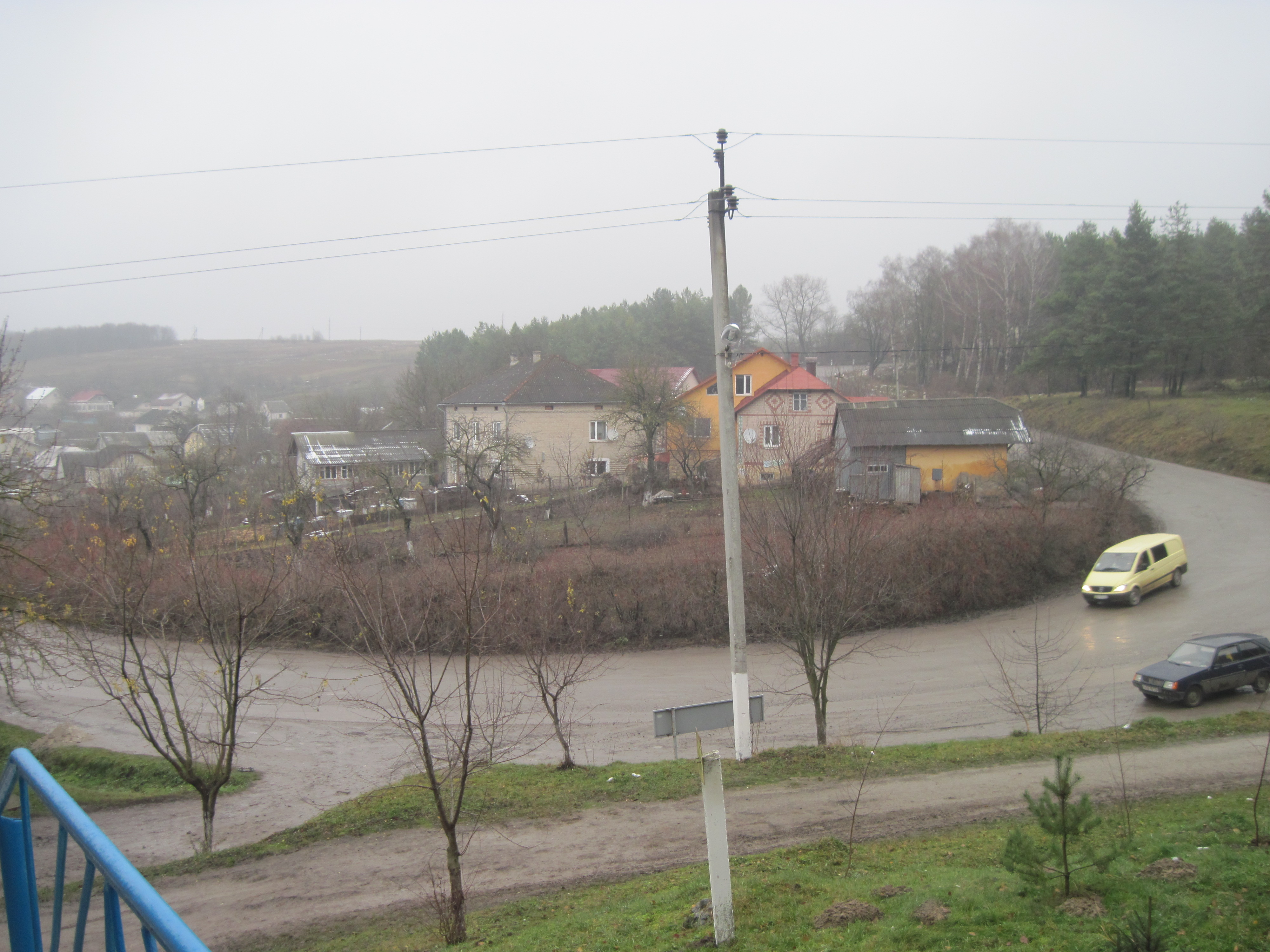 Околиця села Підлісся поблизу Бучача, осінь 2014